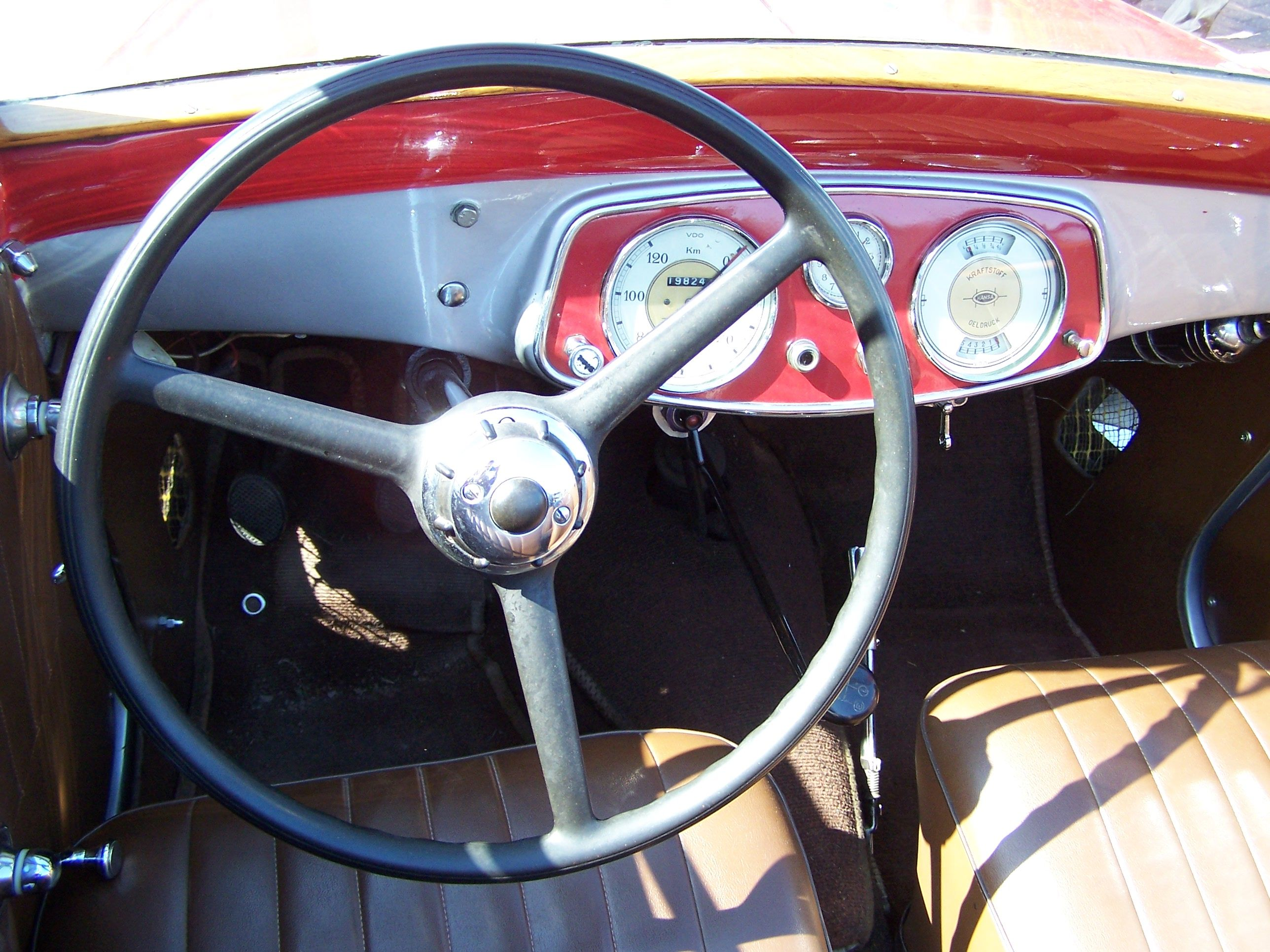 Hansa 1100 dashboard